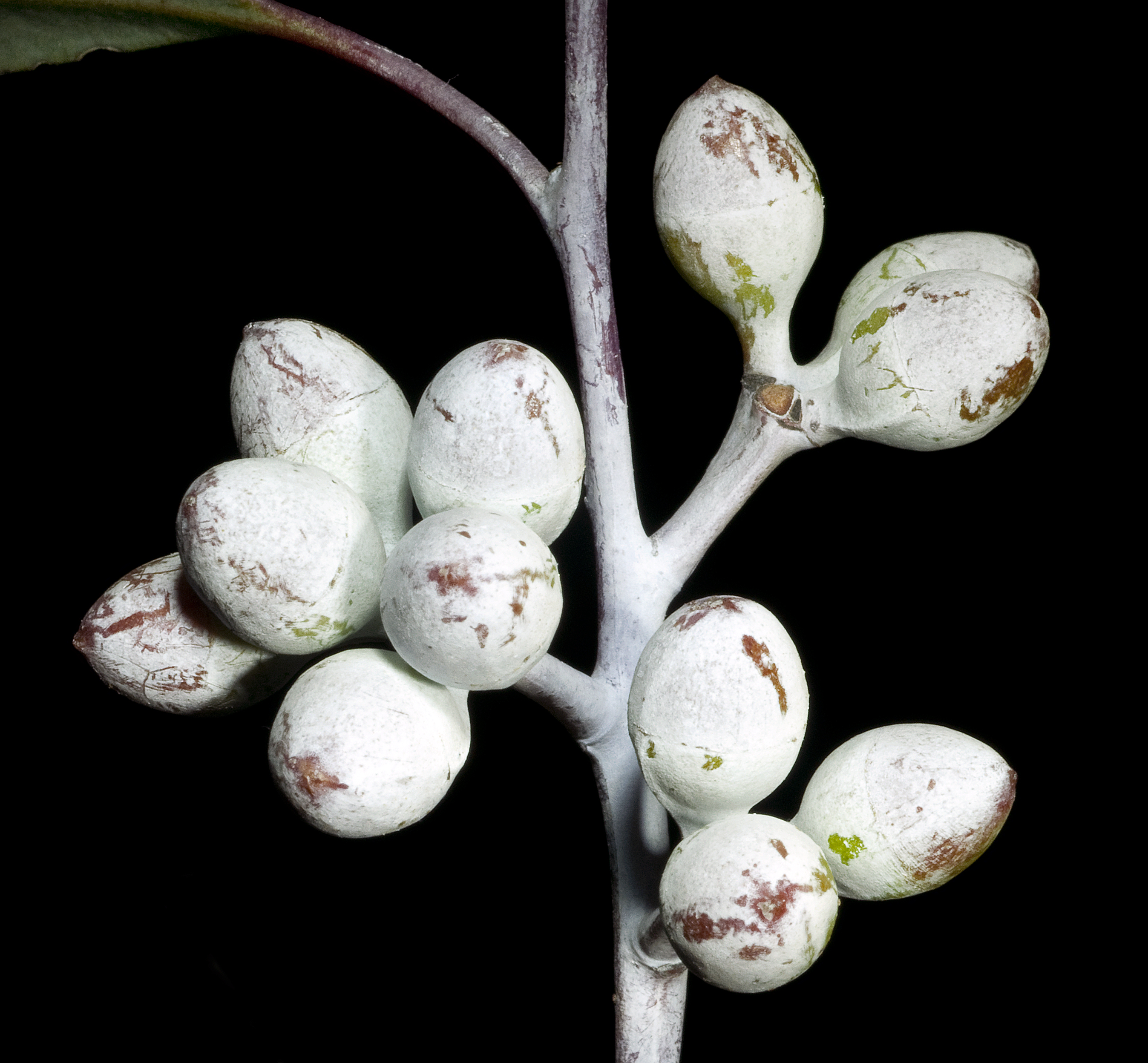 KRT4159